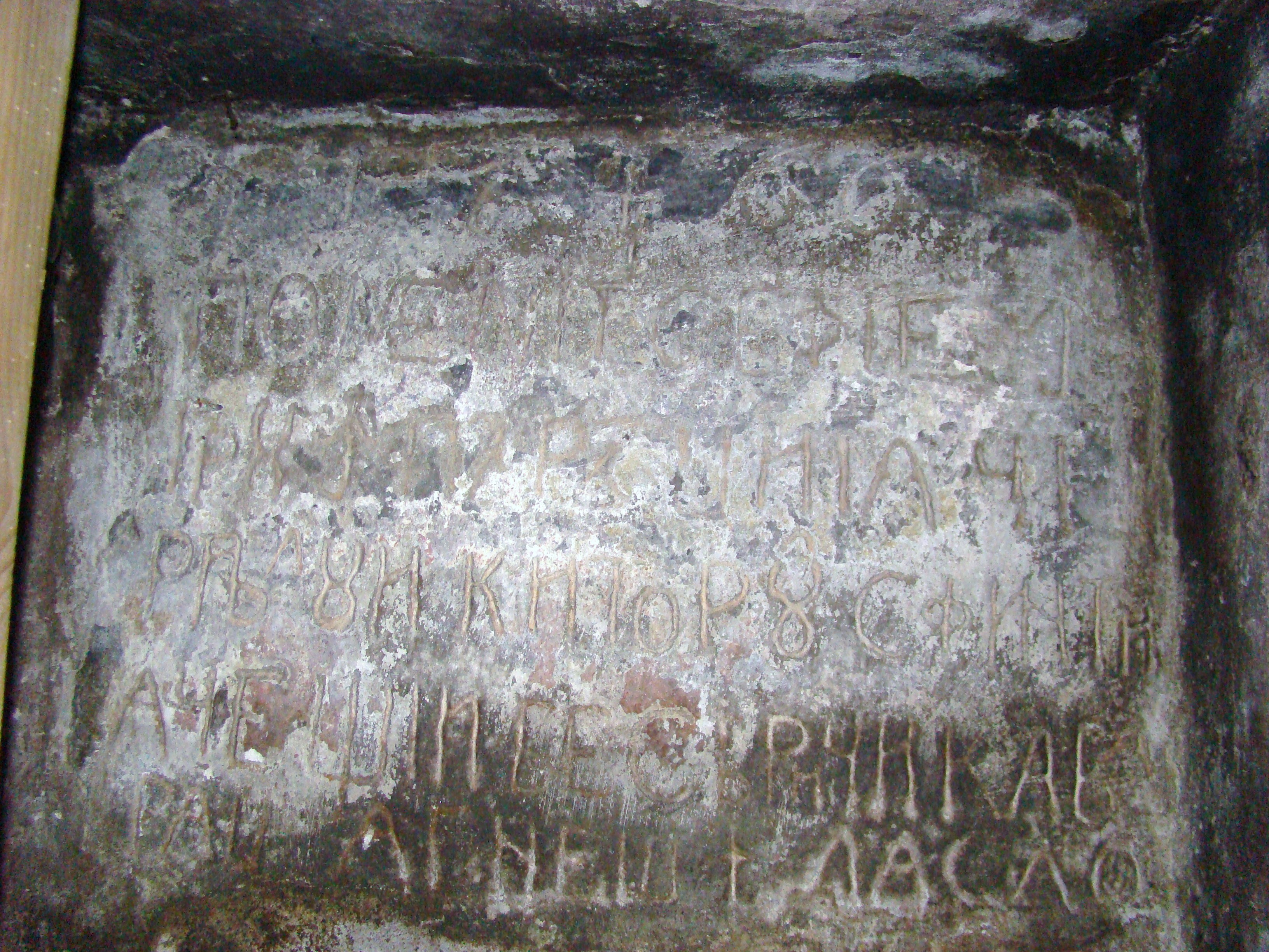 Biserica "Buna Vestire", sat ROŞCANI; comuna DOBRA